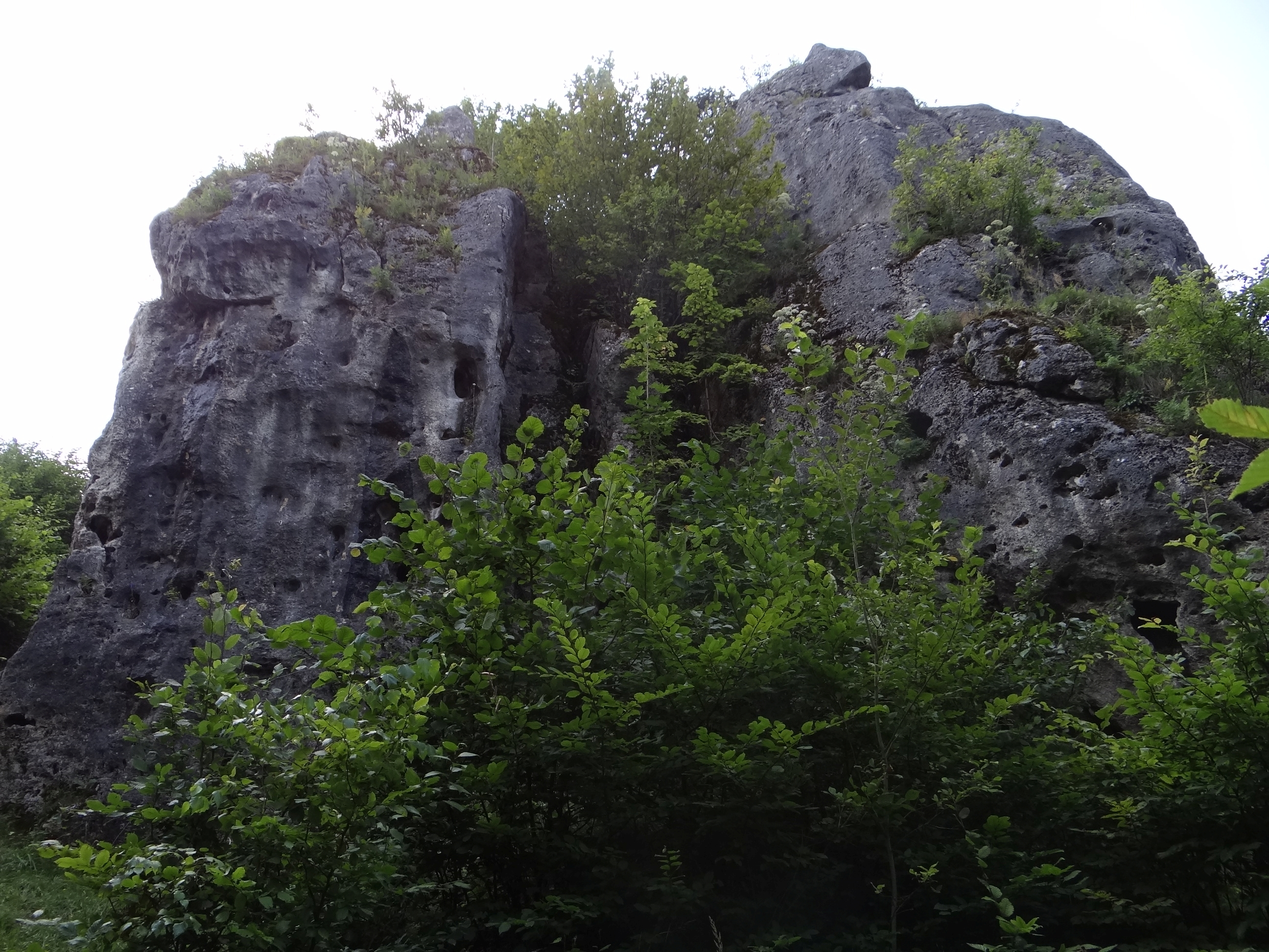 Grupa Łysej w Łutowcu